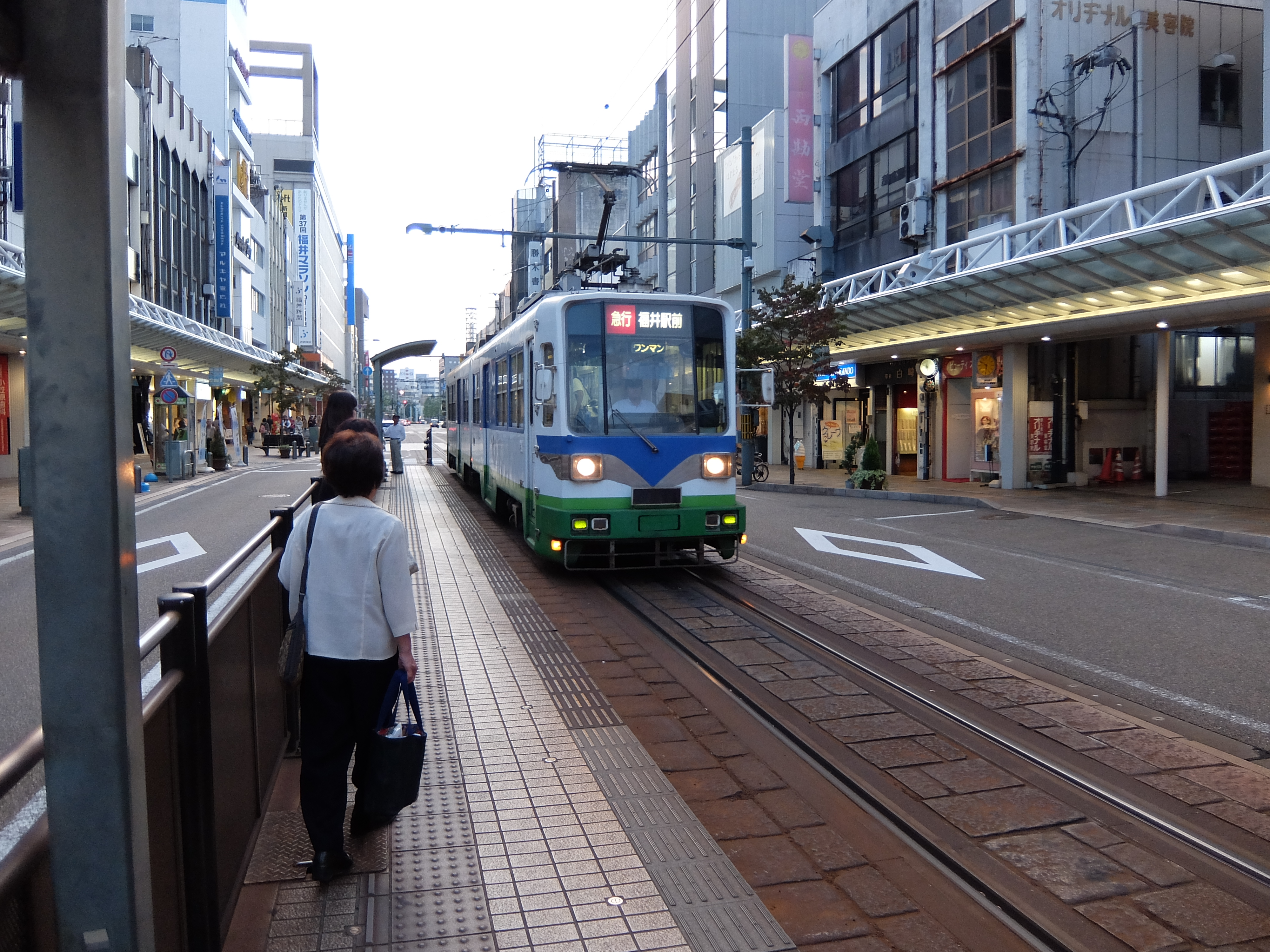 福井鉄道 福井駅前駅